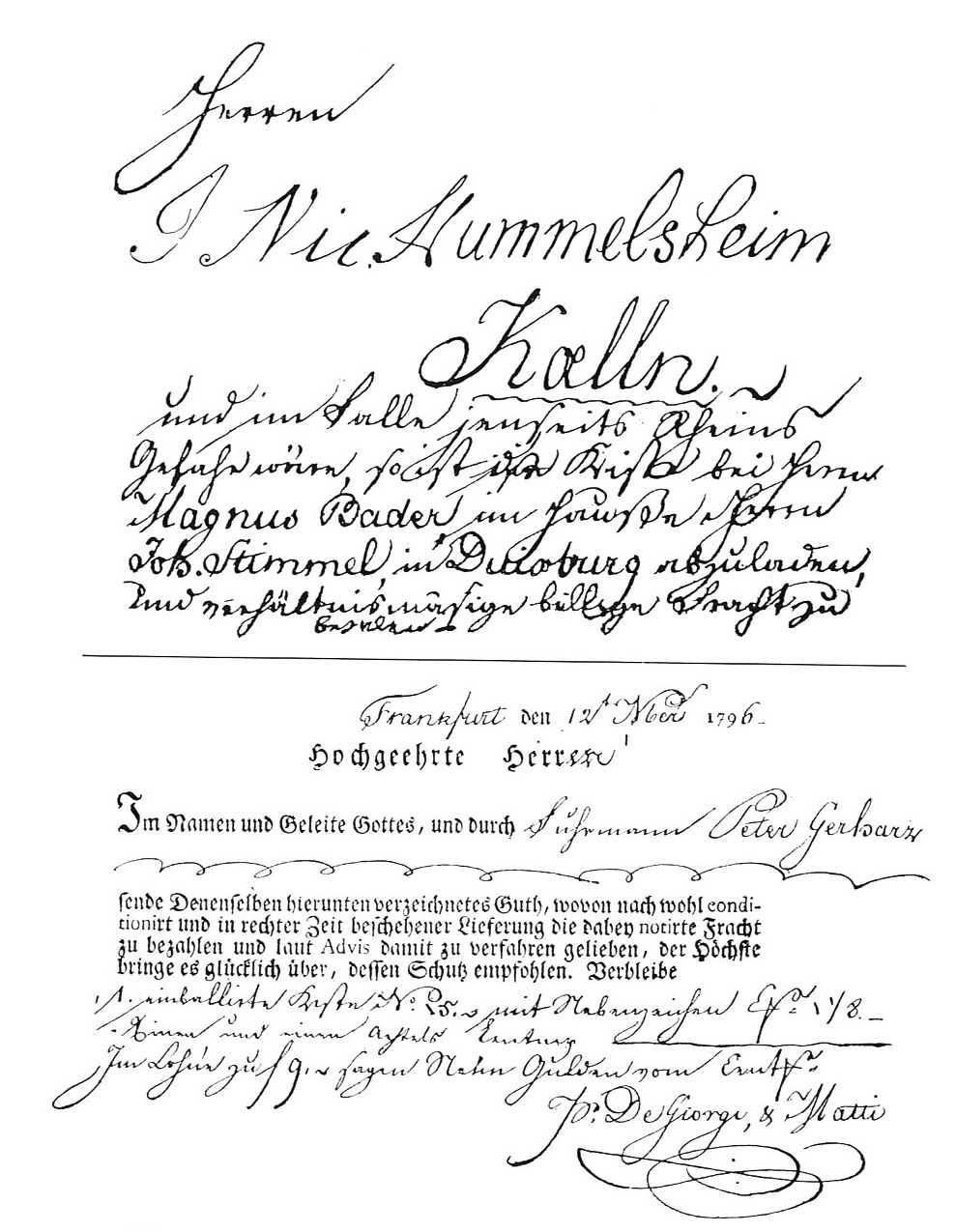 Frachtbrief (Kerzenfabrik Joh. Schlösser), Köln